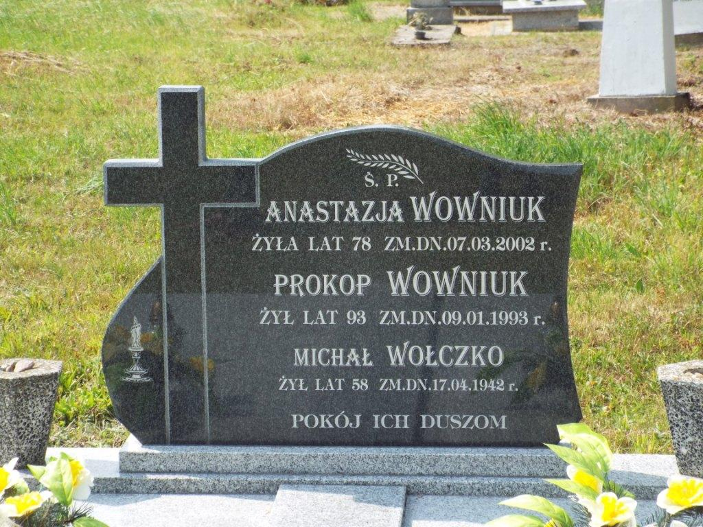 Hola, cmentarz prawosławny - nagrobek Prokopa Wawniuka